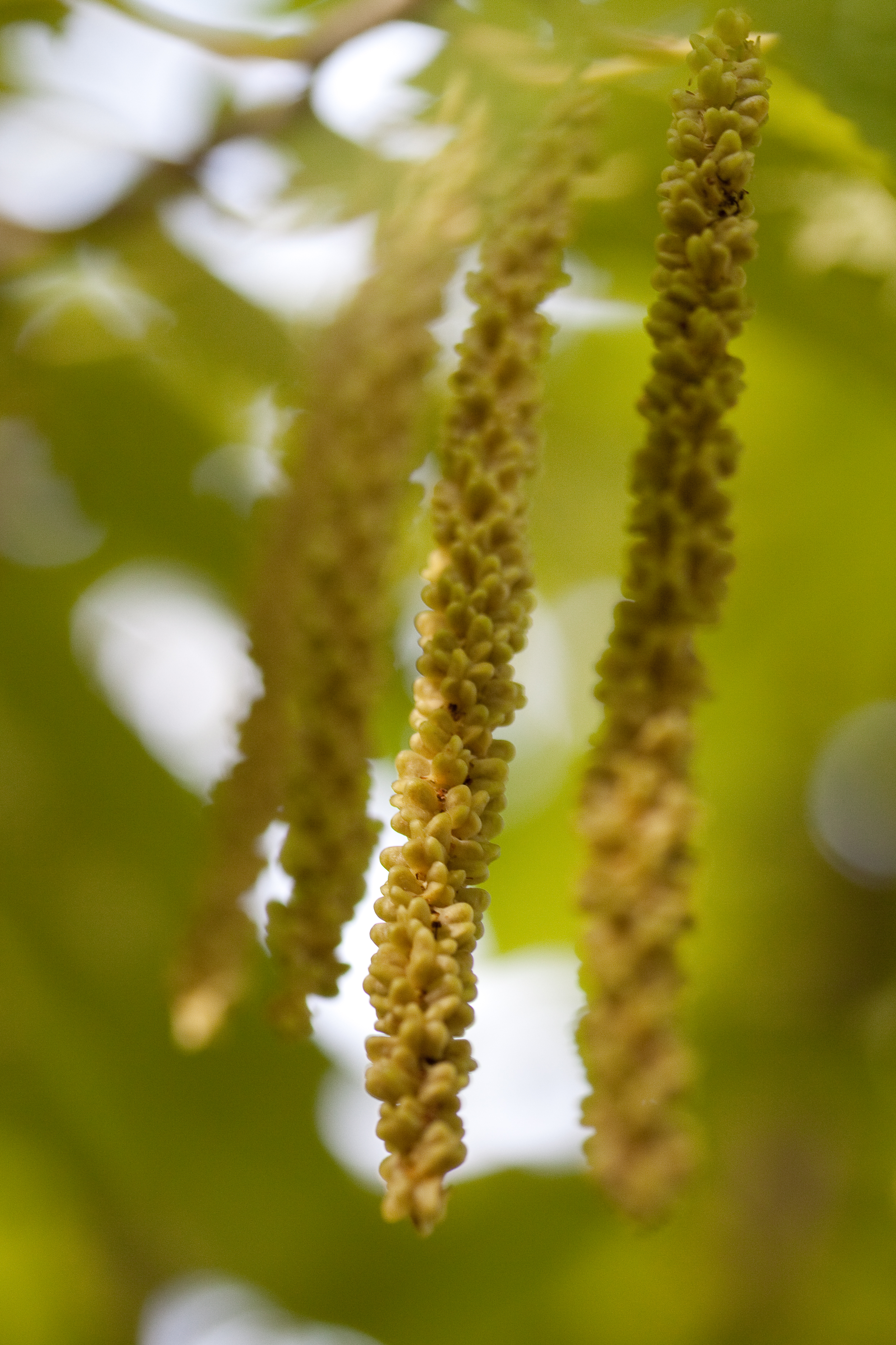 Jeunes graines de Tetracentron sinense - Jardin botanique de Strasbourg - France